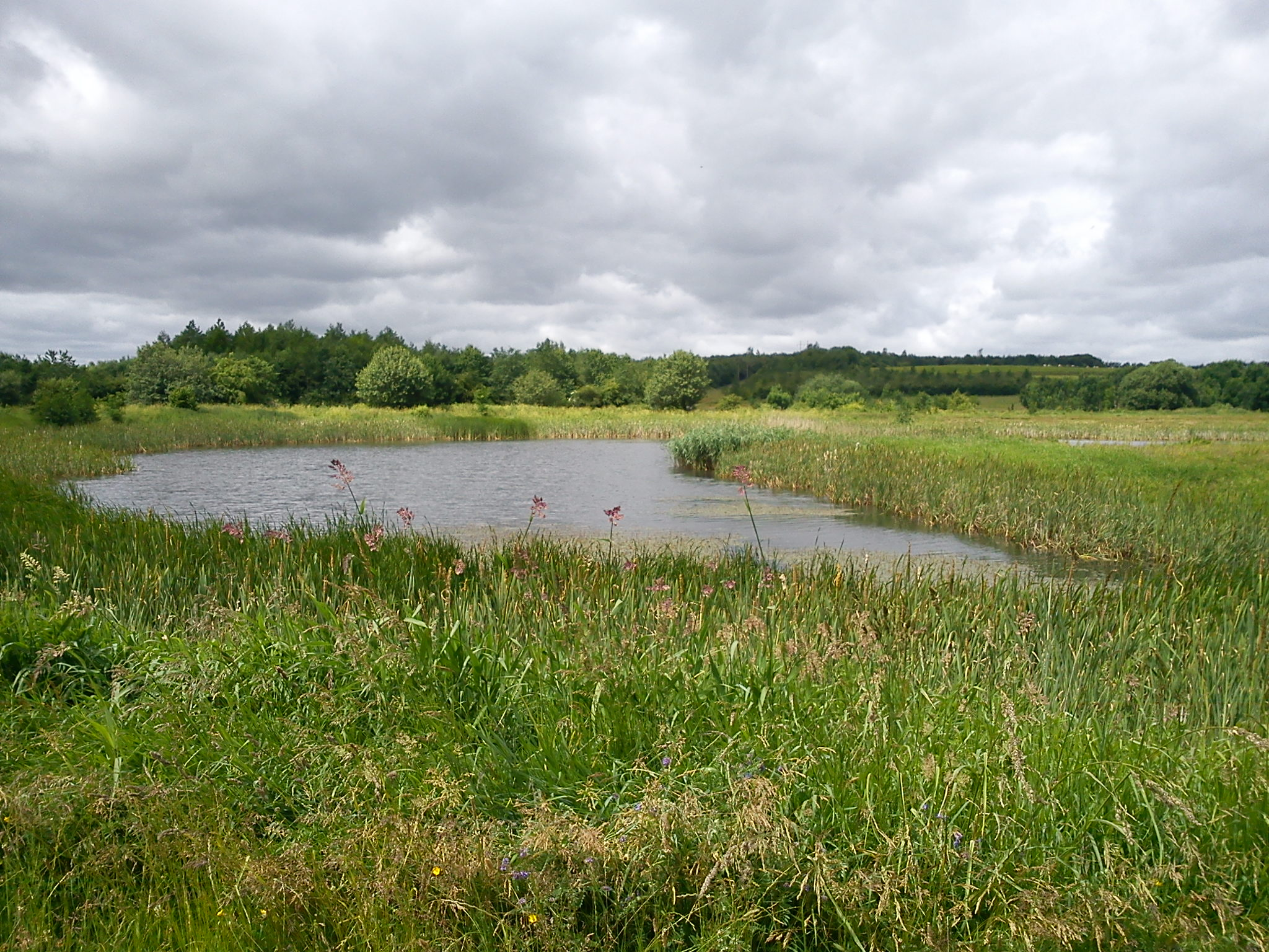 Udsyn mod True Skov fra udkanten af Skjoldhøjkilen.